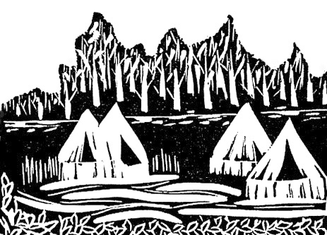 מחנה אוהלים